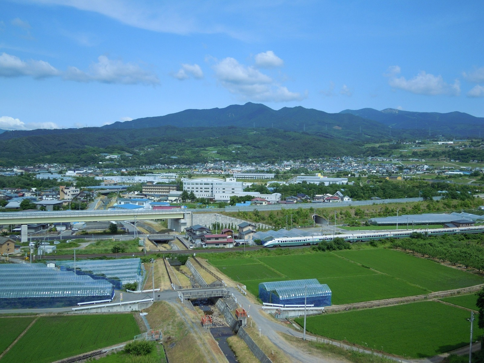 山形県山形市にある黒沢温泉の遠景